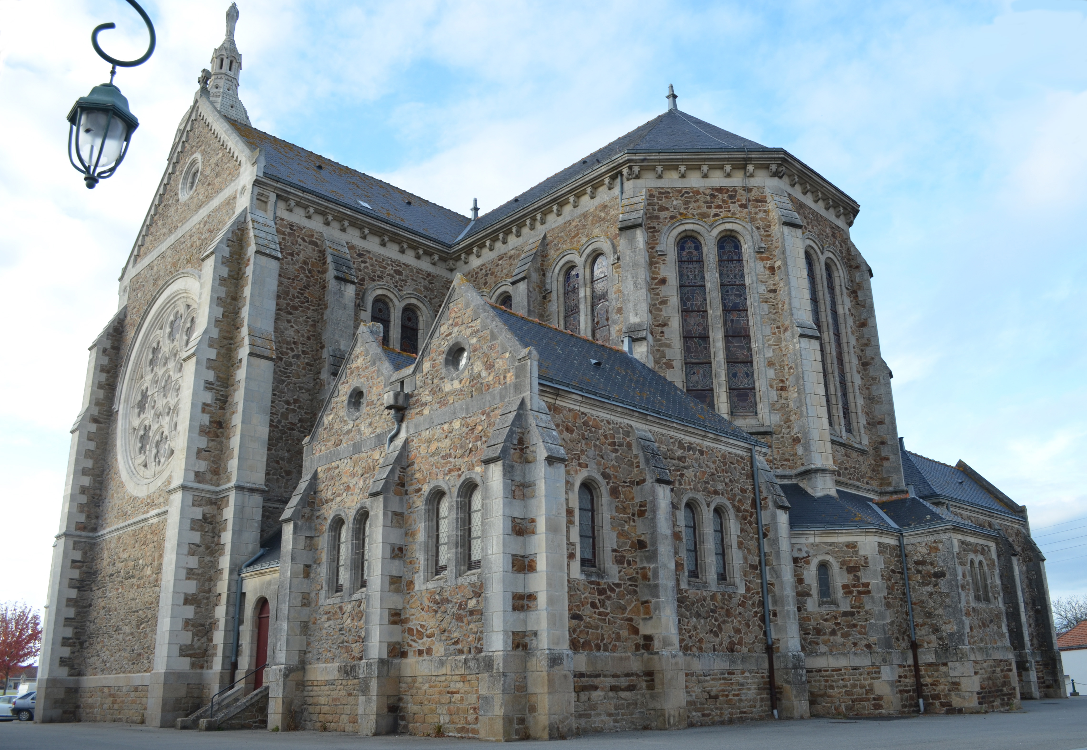 Eglise Saint-Léobin - Saint-Lumine-de-Coutais (Loire-Atlantique)